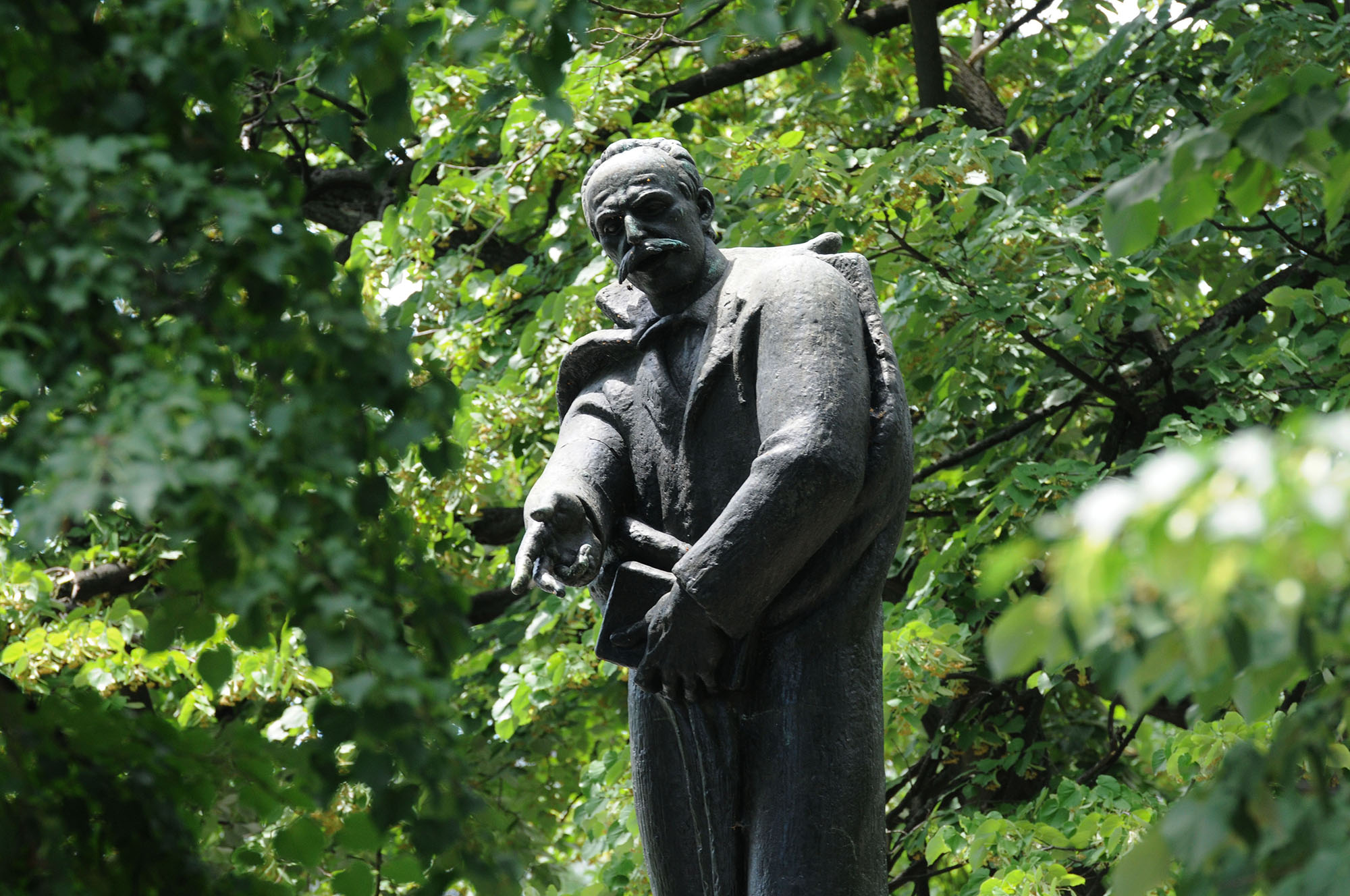 spomenik petar kocic u istoimenom parku Banja Luka Сликава е подигната во рамките на проектот „По трагата на душата 2015“.